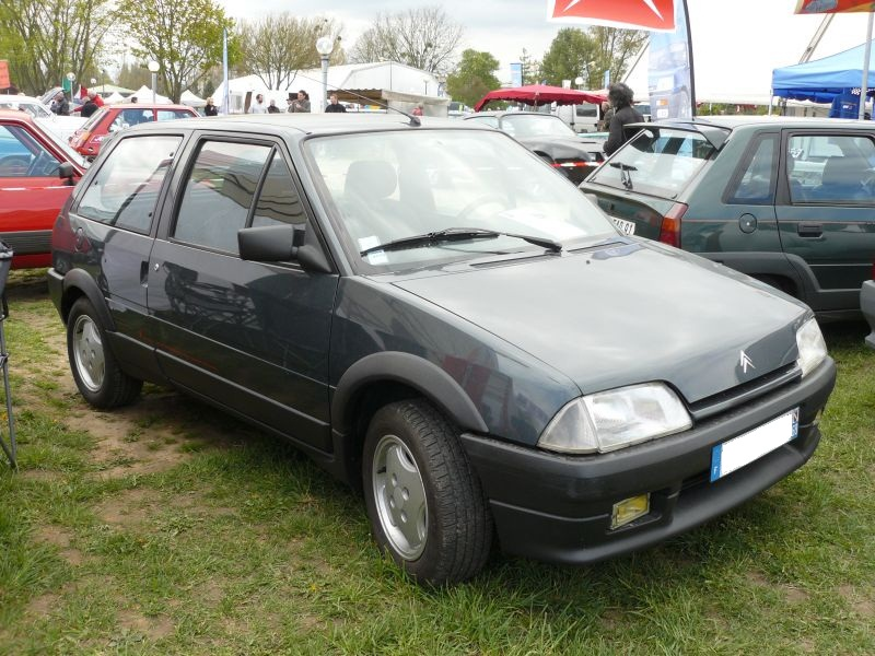 Mantes la Jolie 2012